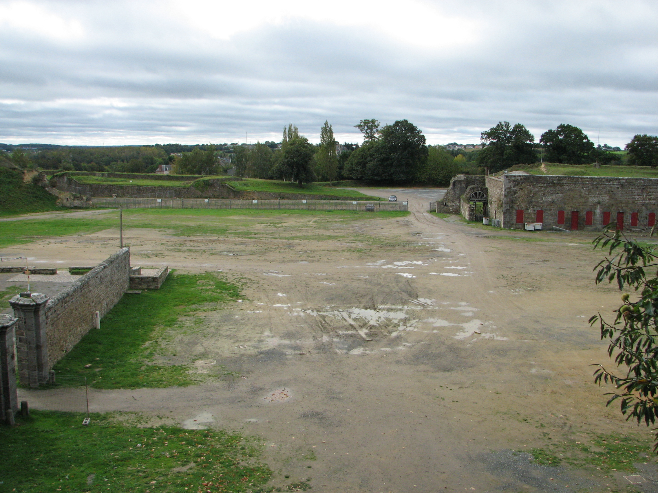 Fort Saint-Père en Ille-et-Vilaine au sud de Saint-Malo